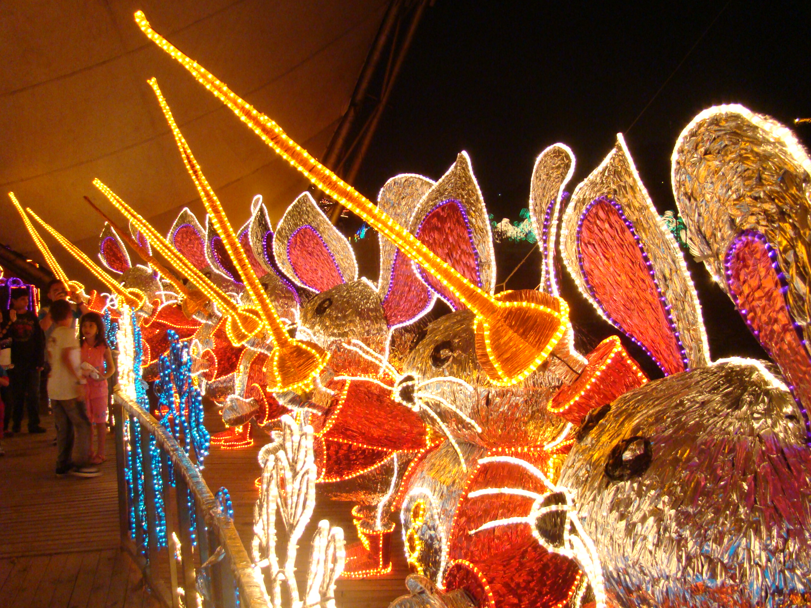 Alumbrado navideño de Medellín de 2010